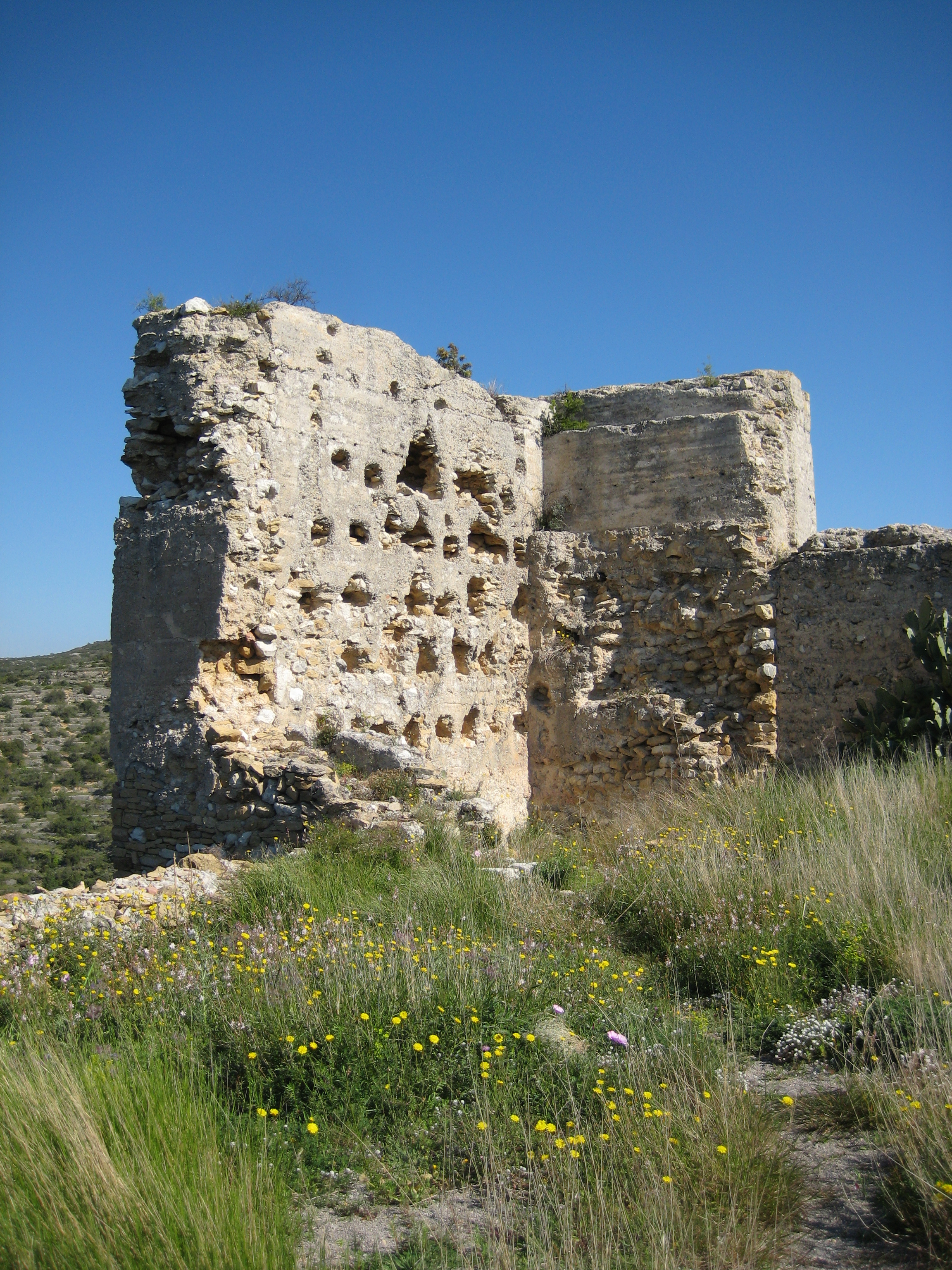 Torre NW del castell de Cervera del Maestrat (Baix Maestrat)